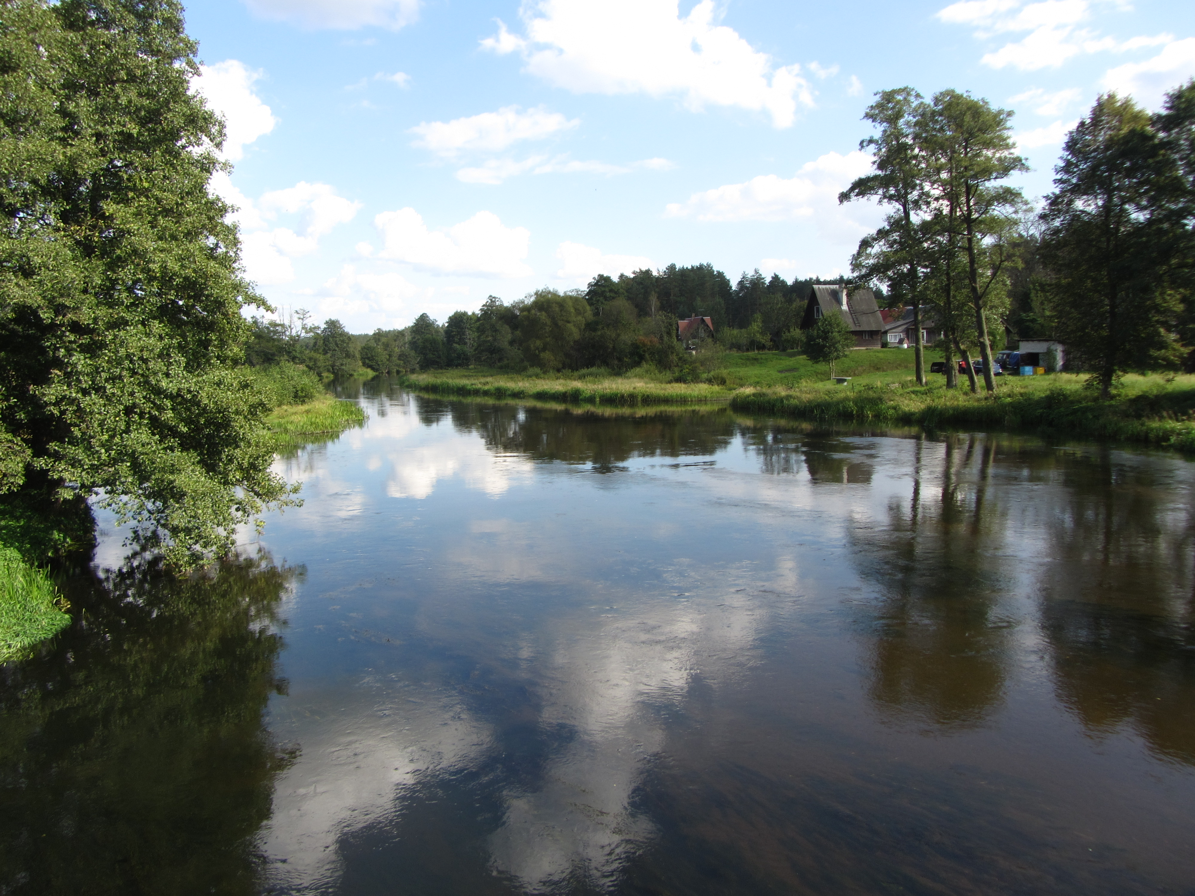 Pamerkiai 65430, Lithuania